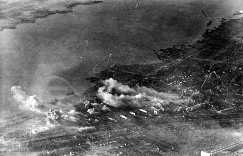 Russland, Kampf um Stalingrad, Luftangriff Scherl: Bildberichter: Sdf. Klose Raum von Stalingrad - 2.10.1942 Serie: Wir stürzen auf Stalingrad. Wir beobachten im Abfliegen die Wirkung unserer Bomben "Frei" O.K.W. Freigegeben Bildpresse: 19.10.1942 5853/42 ADN-Bildarchiv II. Weltkrieg 1939-45 An der Front in der Sowjetunion; Oktober 1942 Angriff von Sturzkampfflugzeugen "Ju 87" der deutschen Luftwaffe am 2.10.auf Stalingrad - im Abflug wird die Wirkung der Bomben beobachtet [Sowjetunion.- Schlacht um Stalingrad]